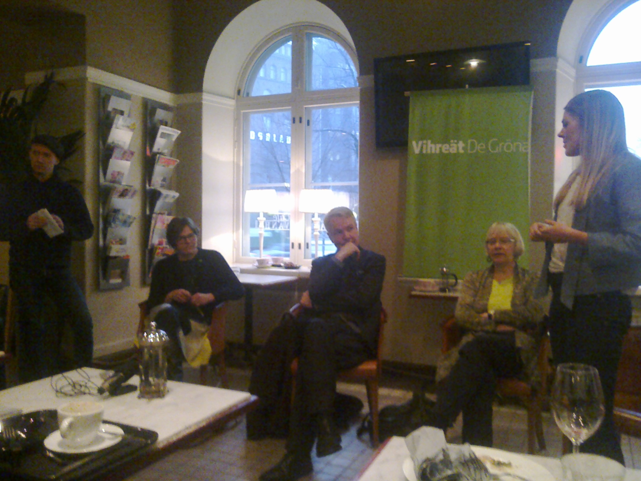 Markus Drake, Heidi Hautala, Pekka Haavisto, Kati Juva ja Alviina Alametsä Vanhassa ylioppilastalossa.